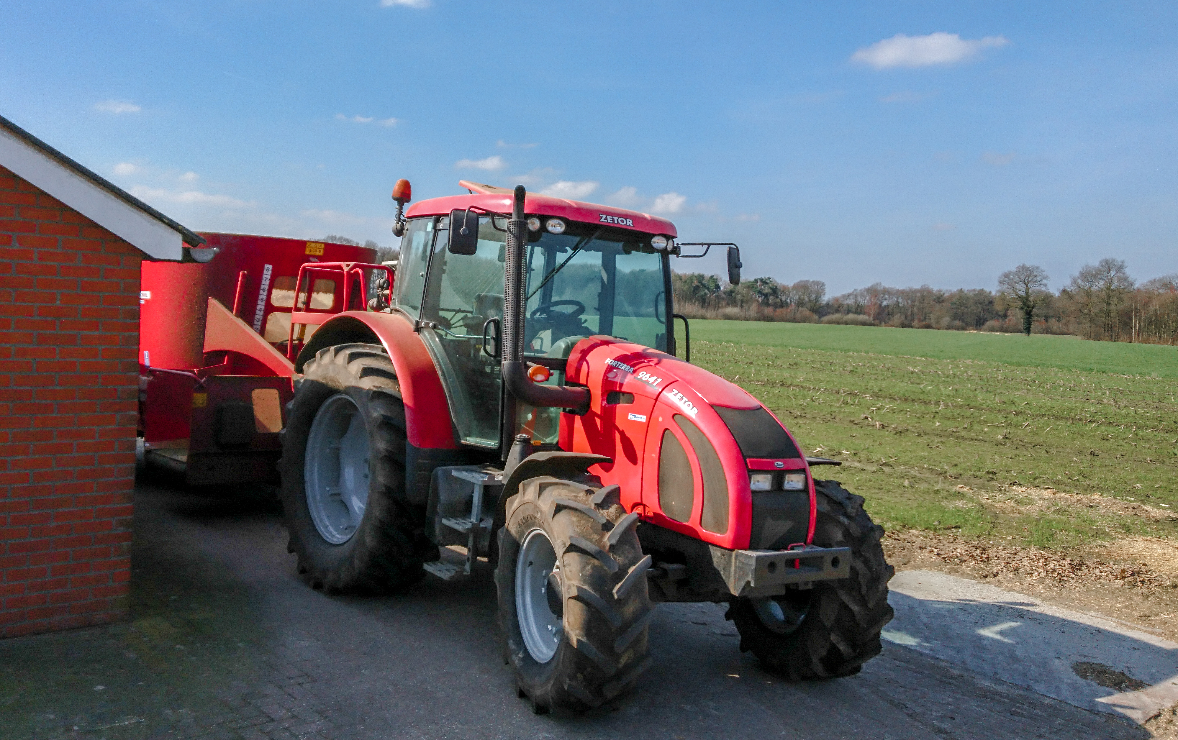 Zetor Forterra 9641